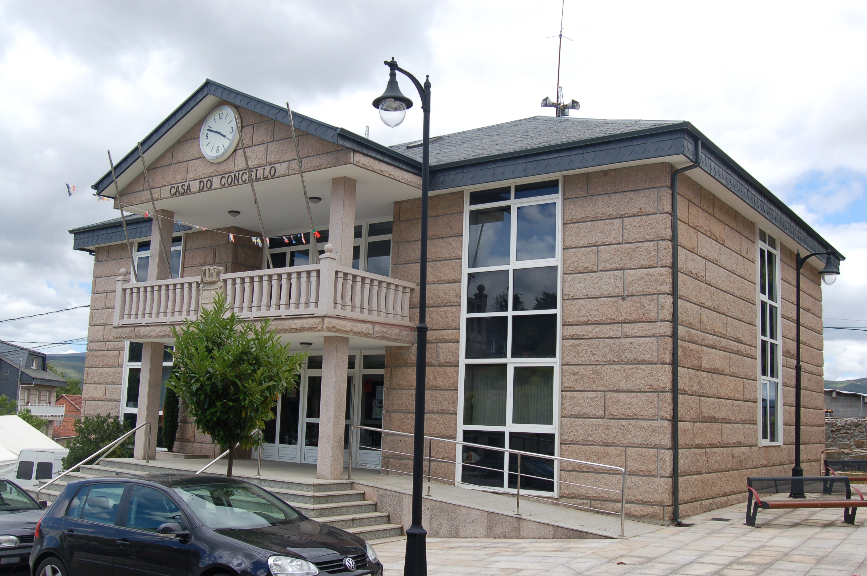 Casa consistorial de Muíños, no lugar de Mugueimes